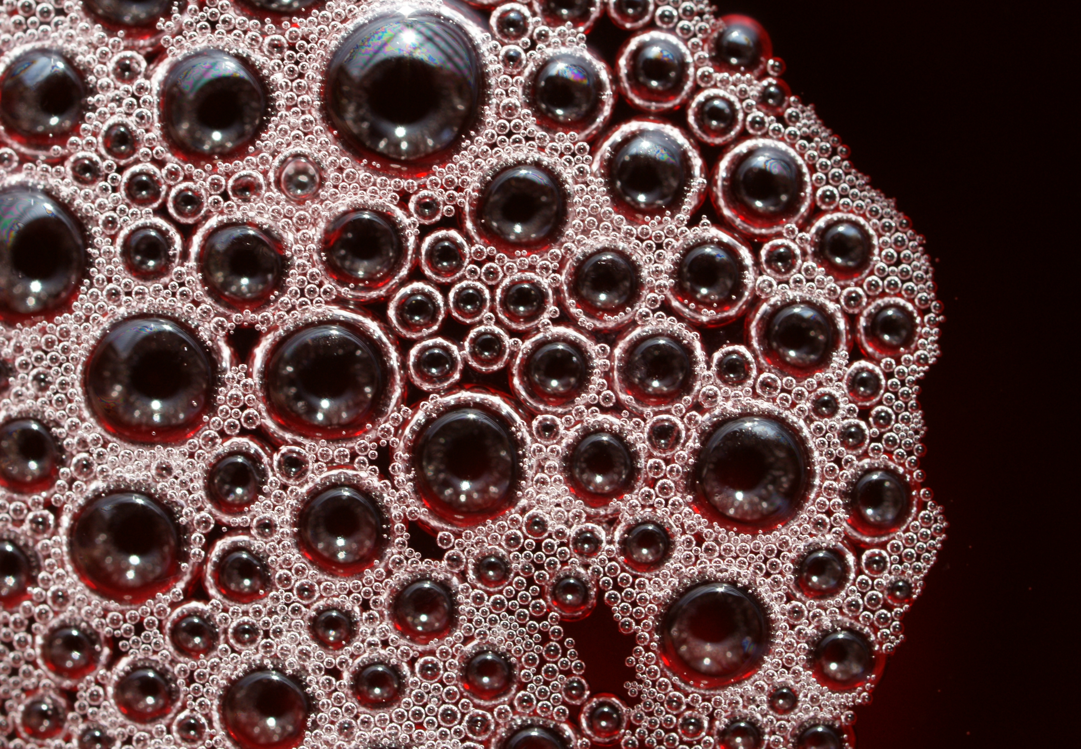 Unter einem Schaum (von lat. spuma) versteht man gasförmige Bläschen, welche von festen oder flüssigen Wänden eingeschlossen sind. Im Bild der Schaum vom Traubensaft.